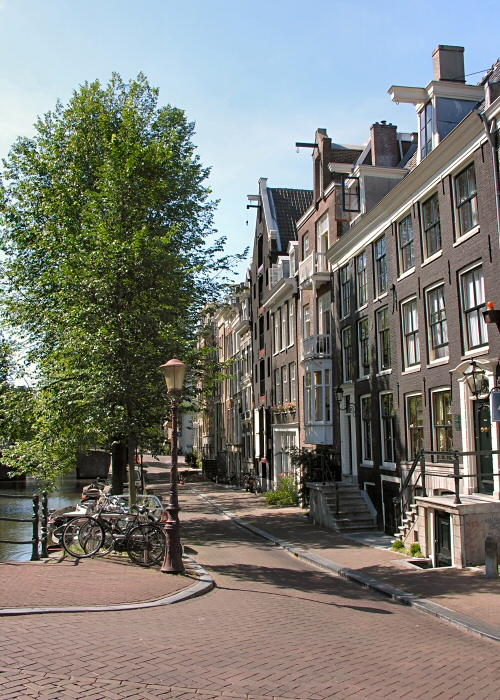 Leaning buildings in Amsterdam